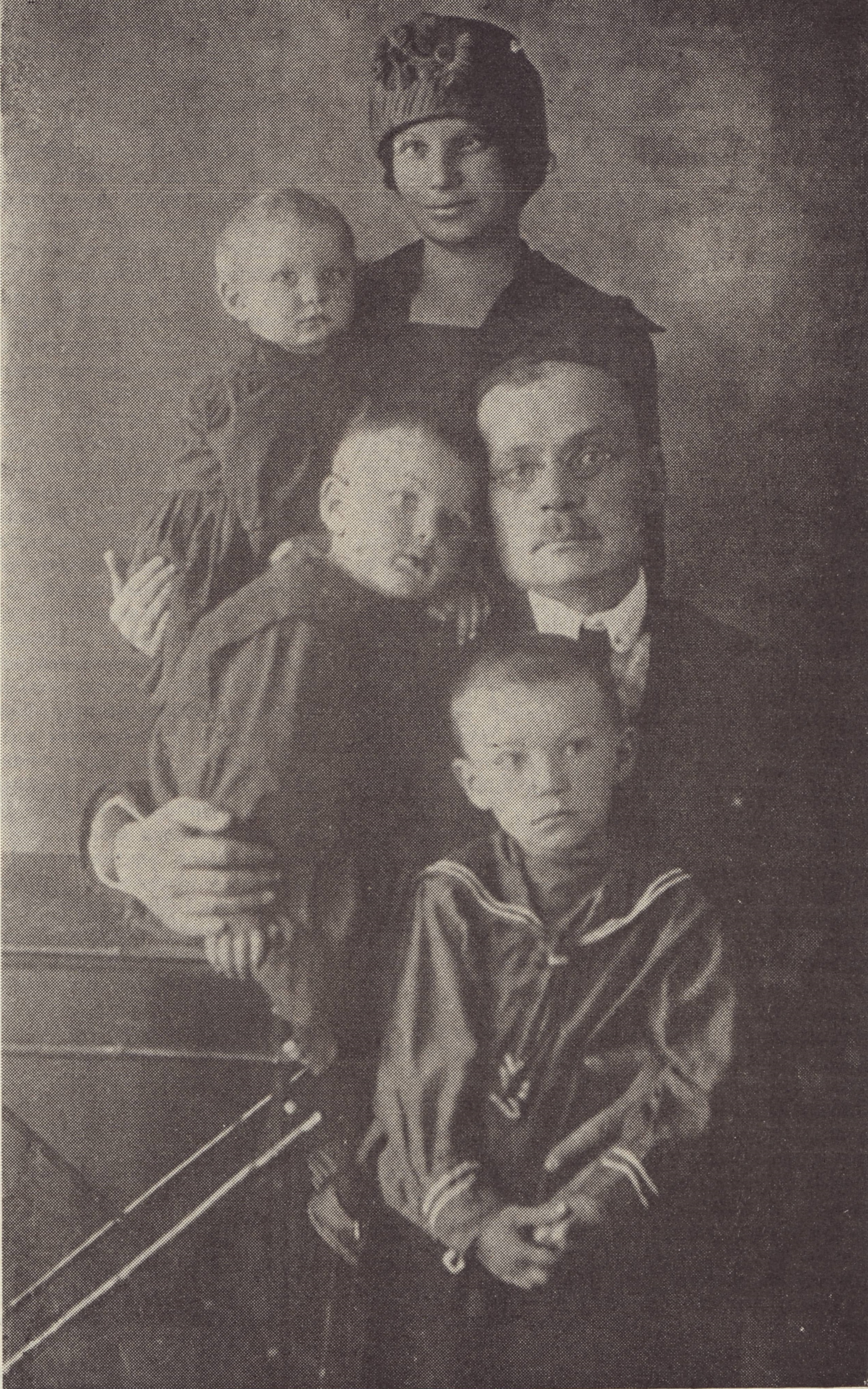 Беларуская (тарашкевіца): Дачка Ядвігіна Ш. Ванда Лявіцкая з мужам Язэпам Лёсікам